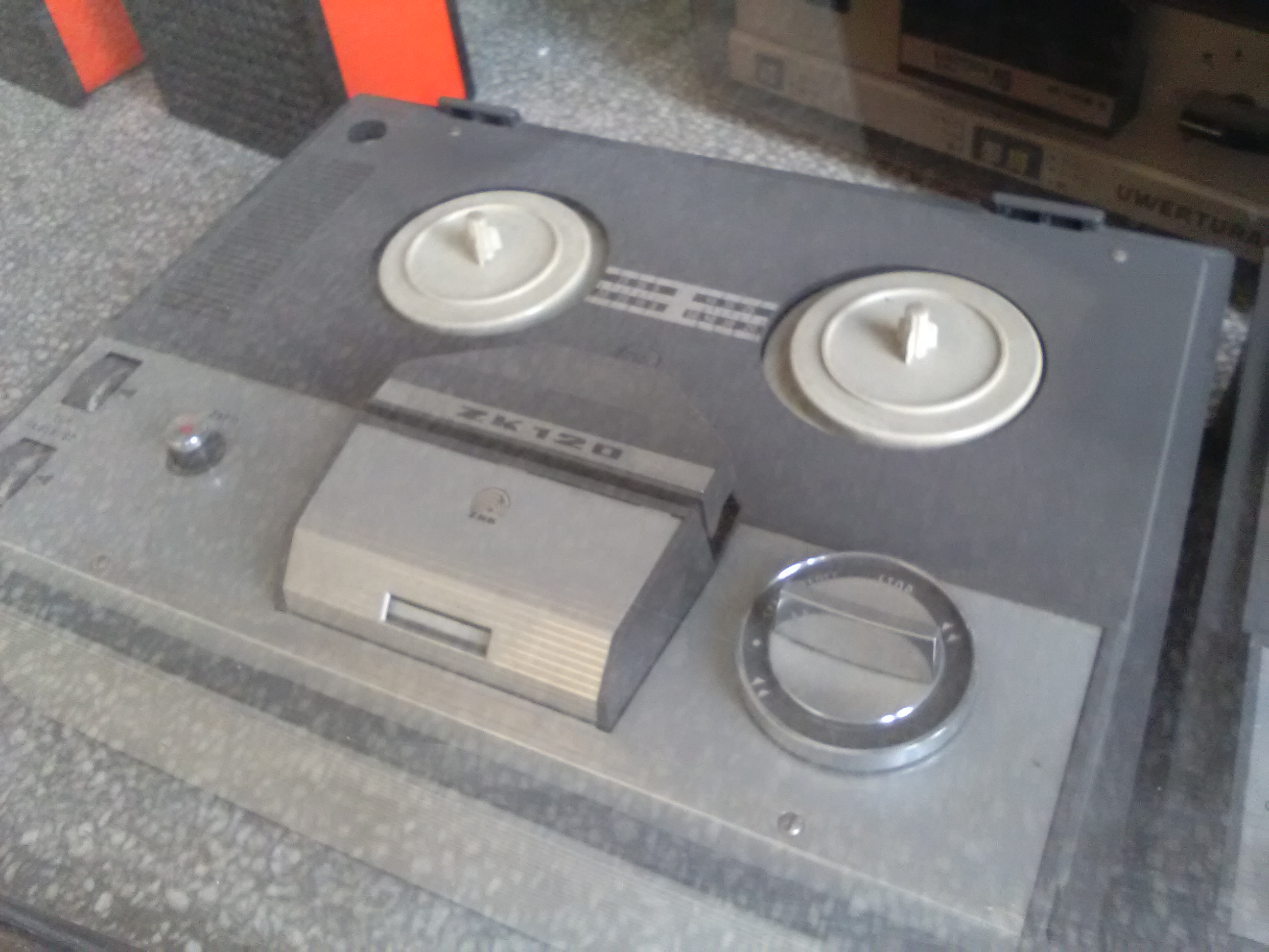 Magnetofon szpulowy ZK 120, Muzeum Unitry w Poznaniu.